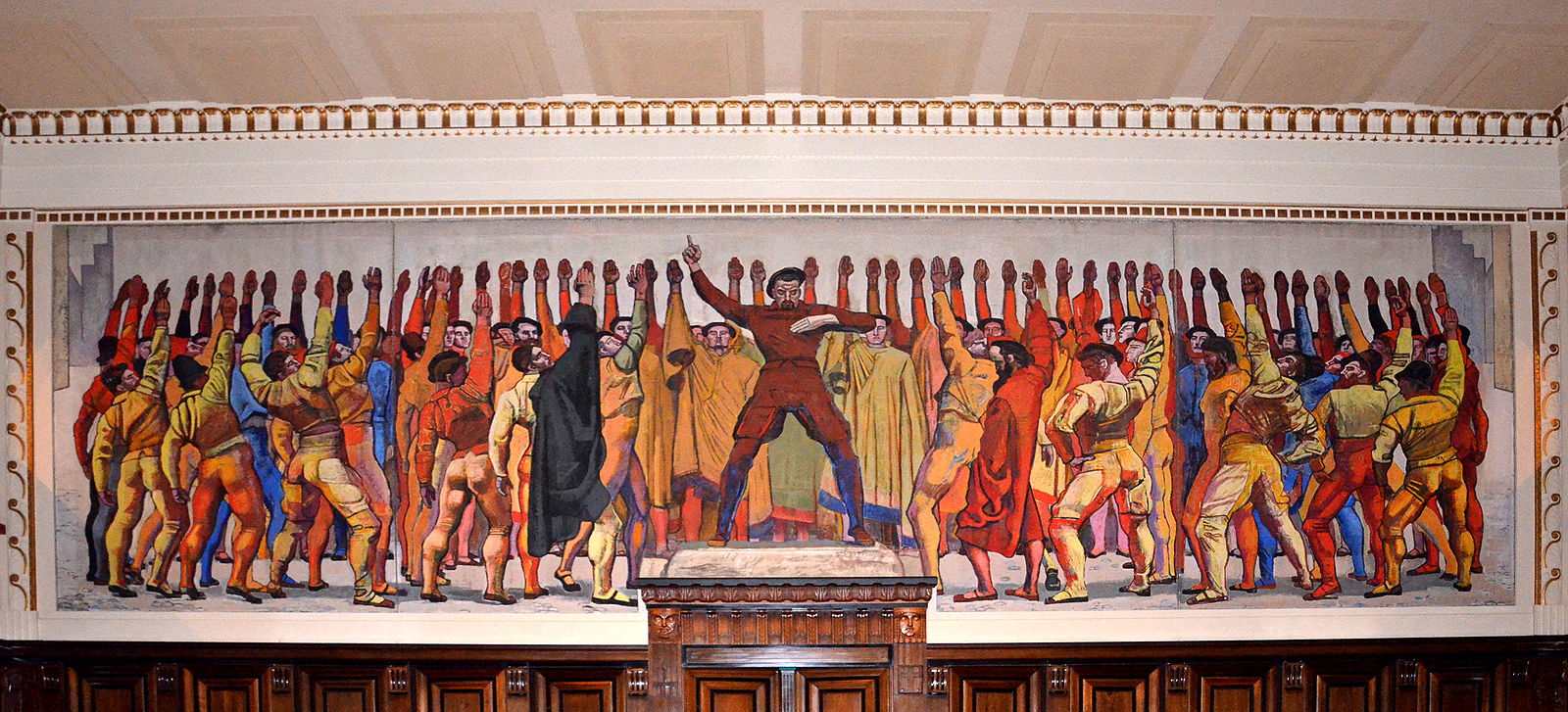 Nach dem Auftrag des hannoverschen Stadtdirektors Heinrich Tramm von 1911 schuf der schweizer Maler Ferdinand Hodler bis 1913 für das Neue Rathaus von Hannover sein Monumentalgemälde Einmütigkeit, das heute in dem nach dem Maler benannten Hodlersaal installiert ist. Das Gemälde im Stil des Symbolismus, das hier den Expressionismus vorwegnimmt, zeigt in der Bildmitte den Worthalter Dietrich (von) Arnsborg (auch: Arensborg), der am 26. Juni 1533 die auf dem Marktplatz (zwischen Altem Rathaus und Marktkirche die dort versammelten Bürger schwören ließ, zur neuen Lehre der durch den Theologen Martin Luther angestossenen kirchlichen Reformation zu stehen ...